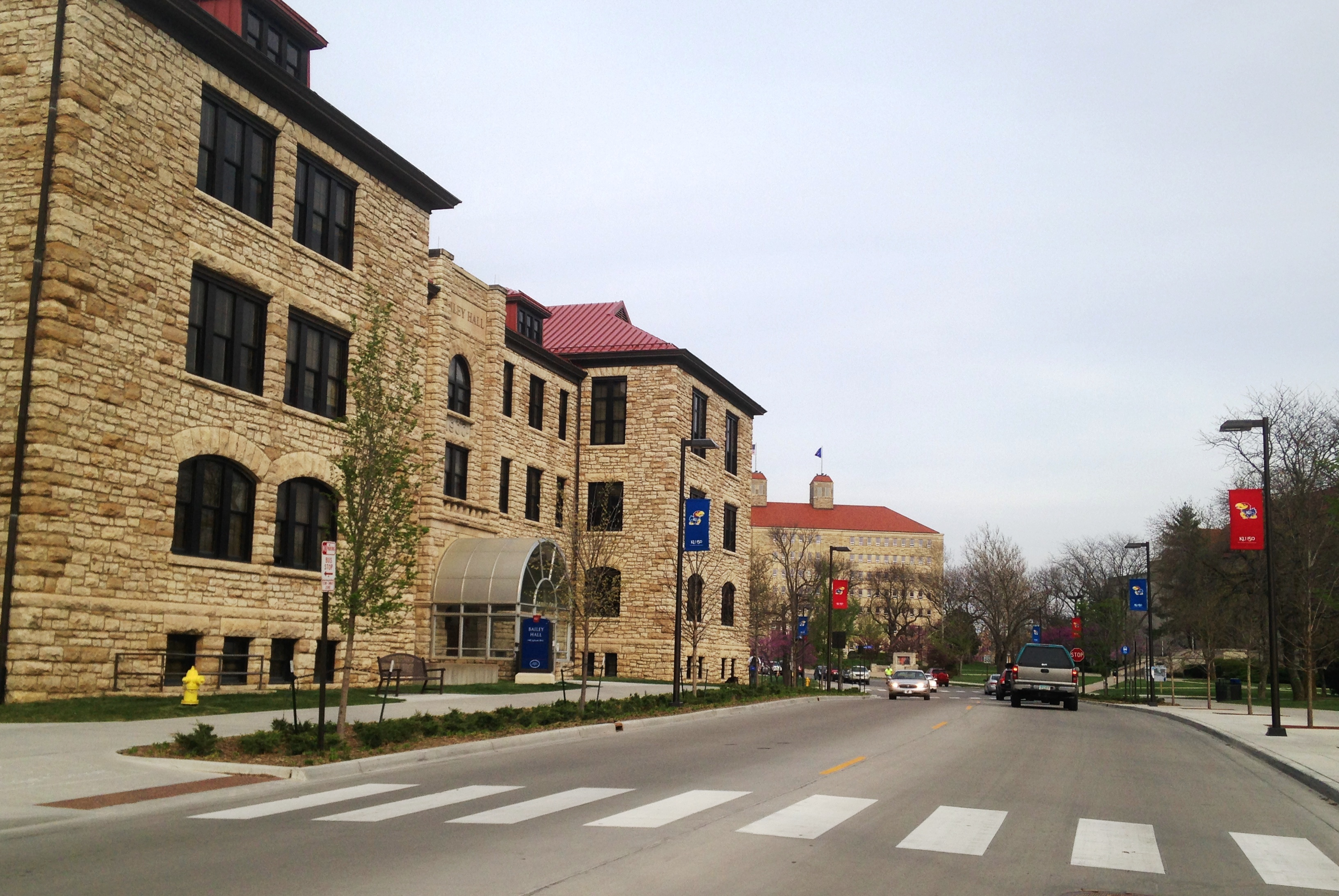 University of Kansas, Lawrence.